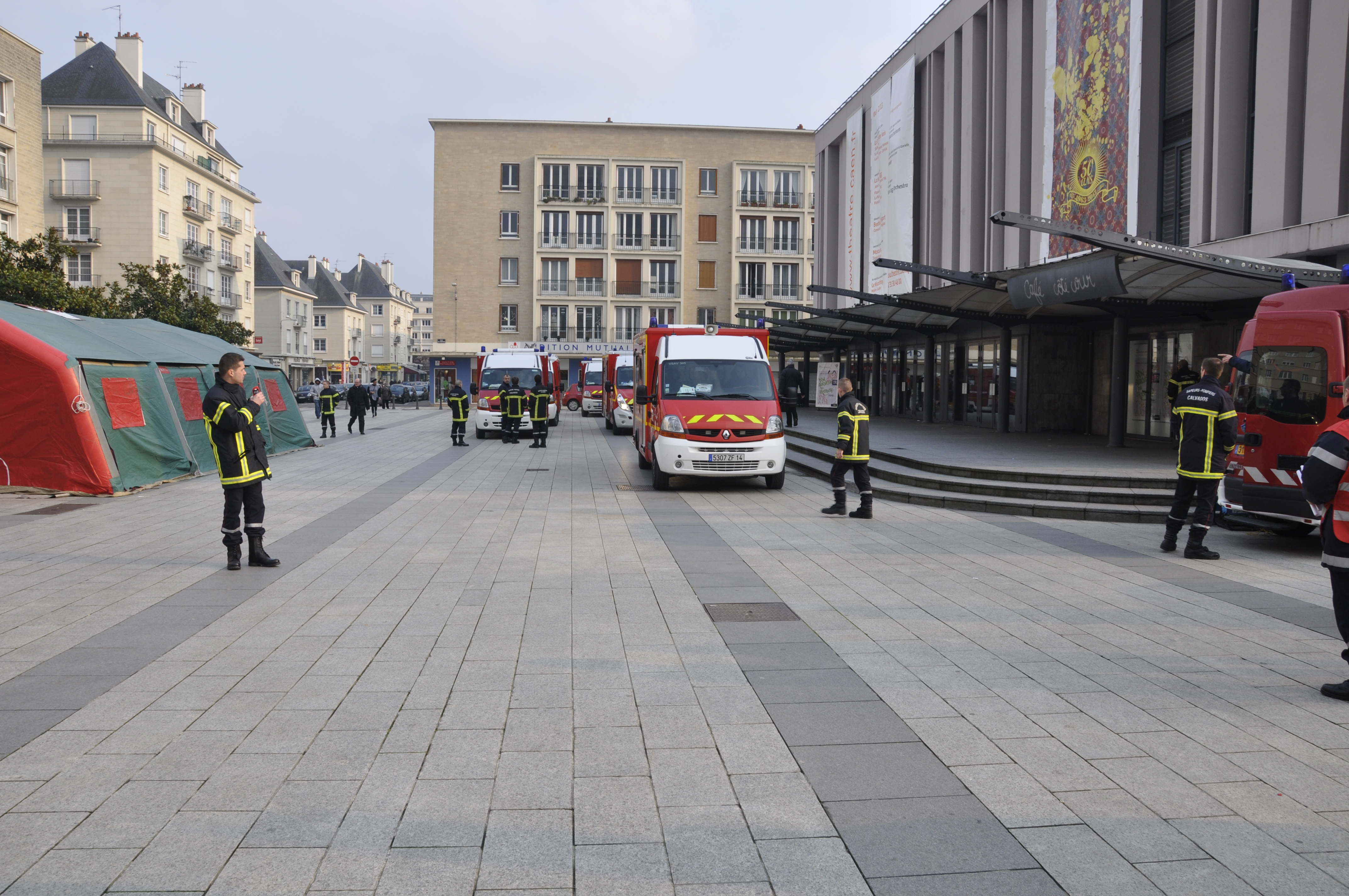 poste médical avancé du carnaval étudiant de Caen en 2013